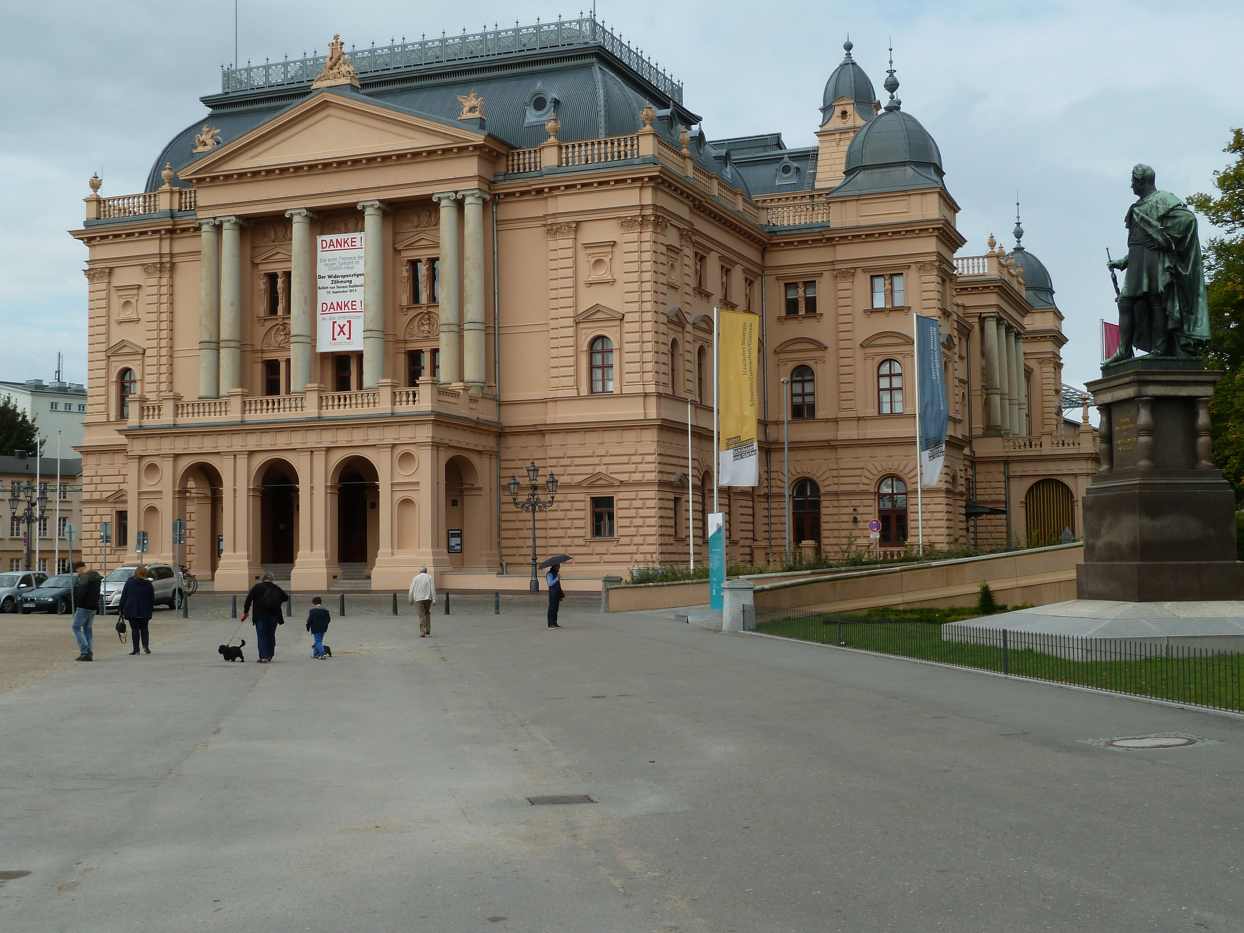 Blick über den Vorplatz auf das Mecklenburgische Staatstheater Schwerin.